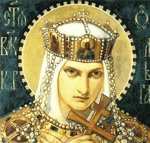 Николай Александрович Бруни. «Ольга (святая великая княгиня)» 1901 холст, масло. 40*40 Государственный Русский музей